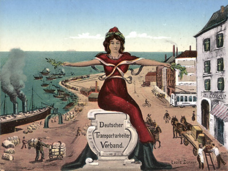 colorierte Postkarte Deutscher Transportarbeiter-Verband um 1910, vermutlich anlässlich der Vereinigung mit dem Verband der Hafenarbeiter; die allegorische Darstellung zeigt die Hauptberufsgruppen des Verbands: Hafenarbeiter, Fuhrleute und Straßenbahnfahrer